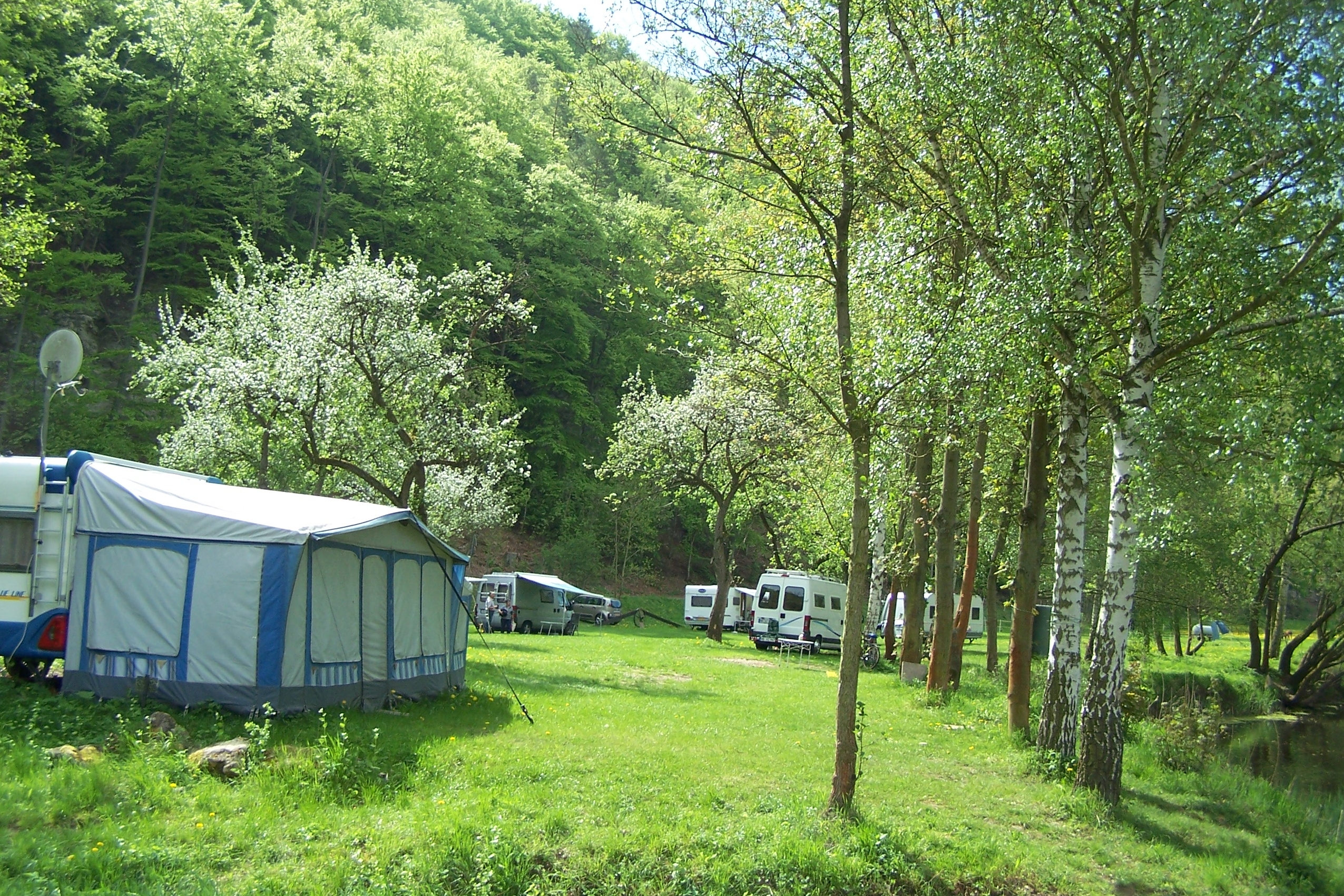 Blick zum Campingplatz bei Probsteizella.